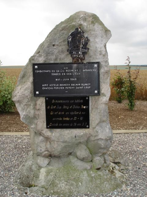 Saint Loup En Champagne Source Fait Moi même Date="2008.08.04" Auteur Thoin1233